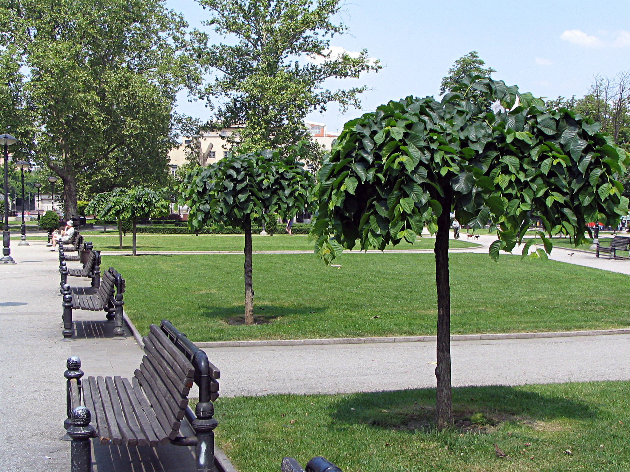 Хортикултурна форма горског бреста са висећим гранама (U. glabra 'Pendula') калемљена на сибирски брест (Парк Ћирило и Методије - Београд, фото: Михаило Грбић)